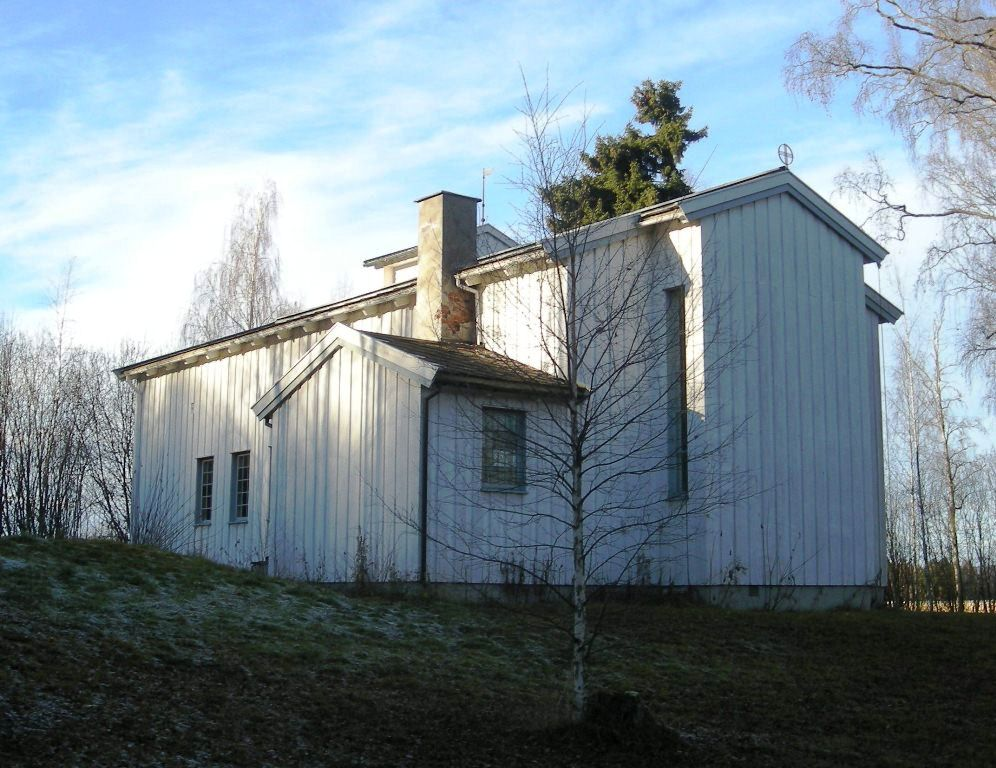 Sanderud kapell (ved Sanderud sykehus, Stange kommune)